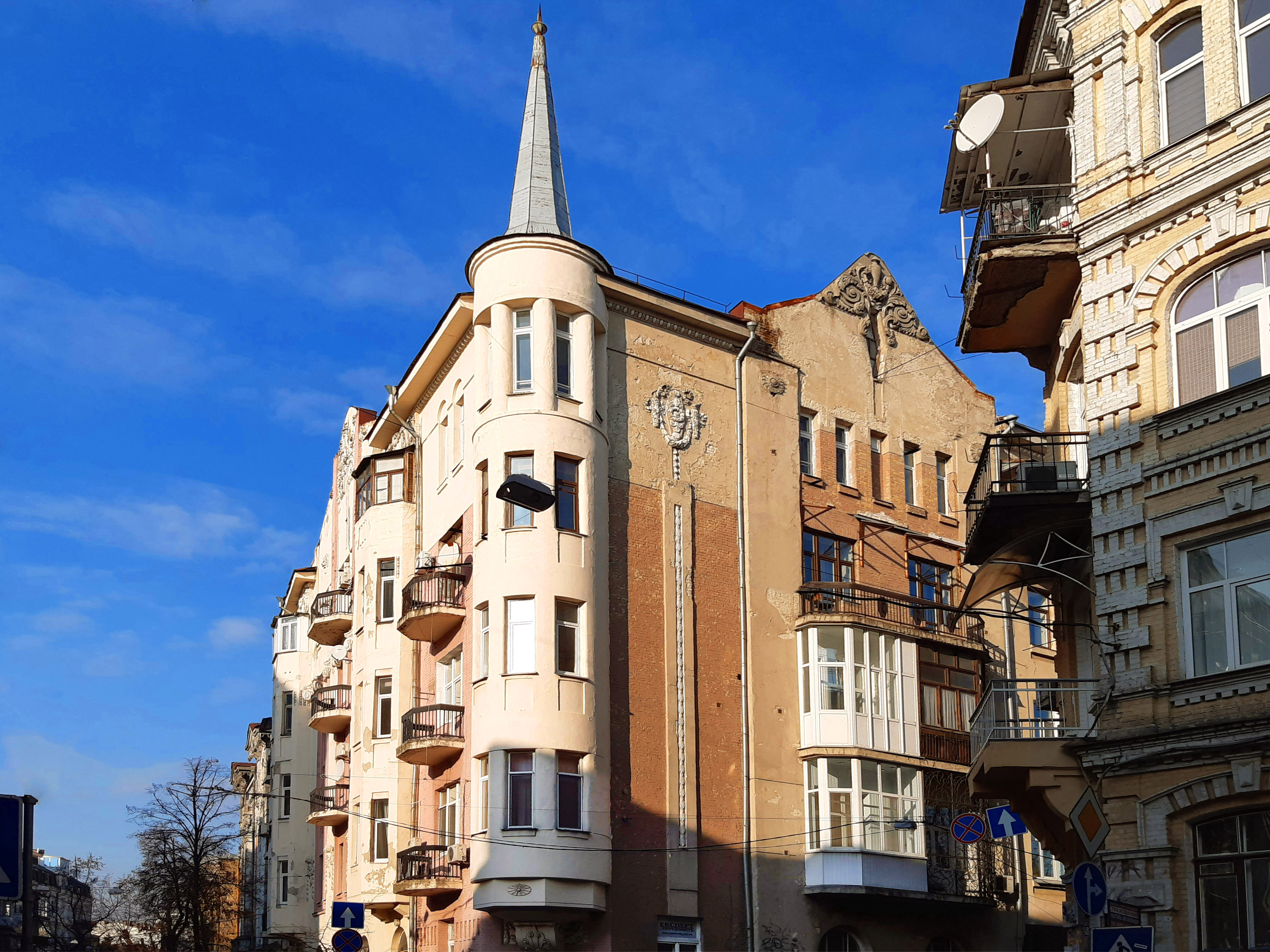 Прибутковий будинок, Київ, вулиця Рейтарська, 20/24